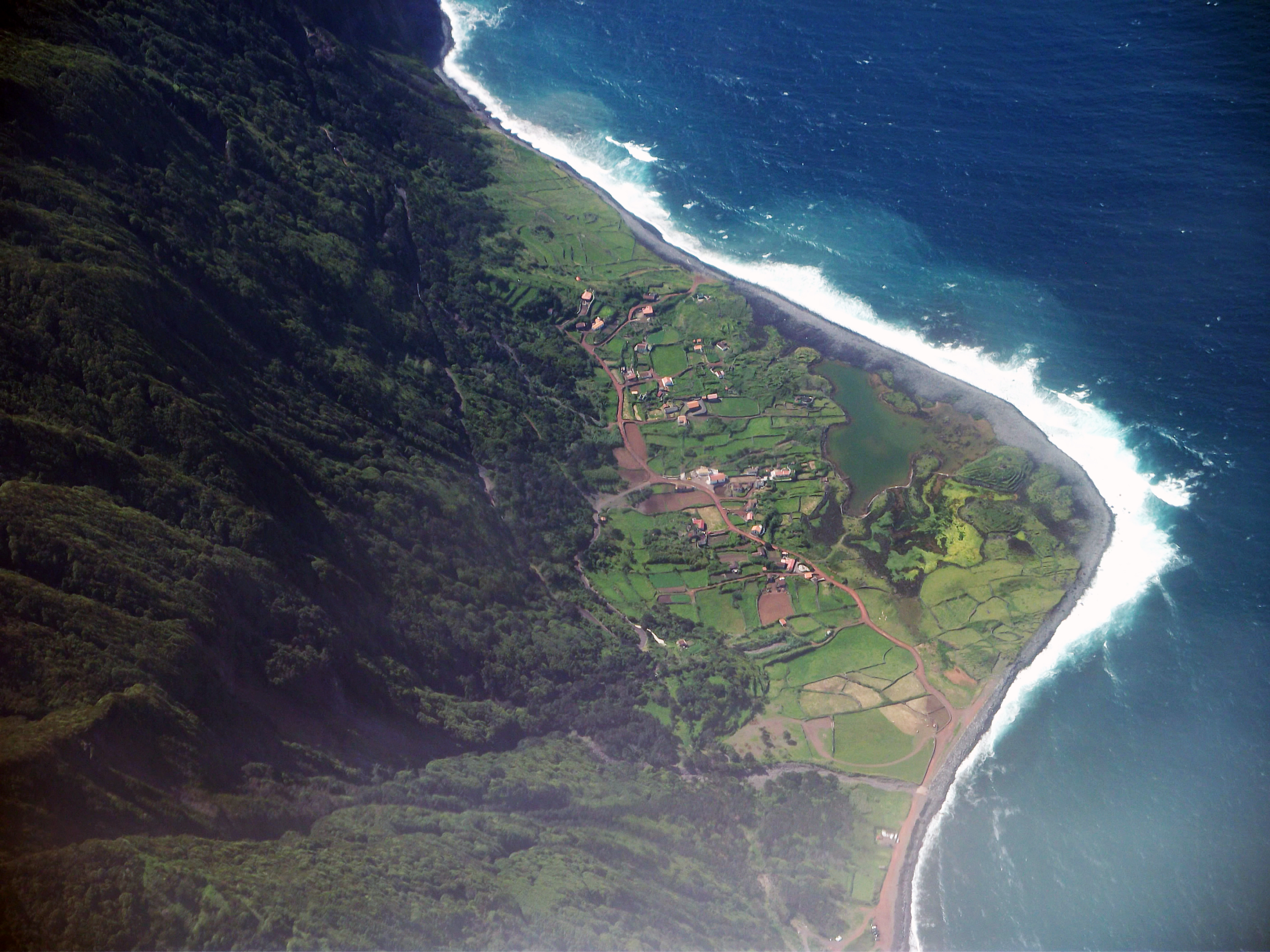 Fajã dos Cubres, vista parcial, ilha de São Jorge, Açores, Portugal